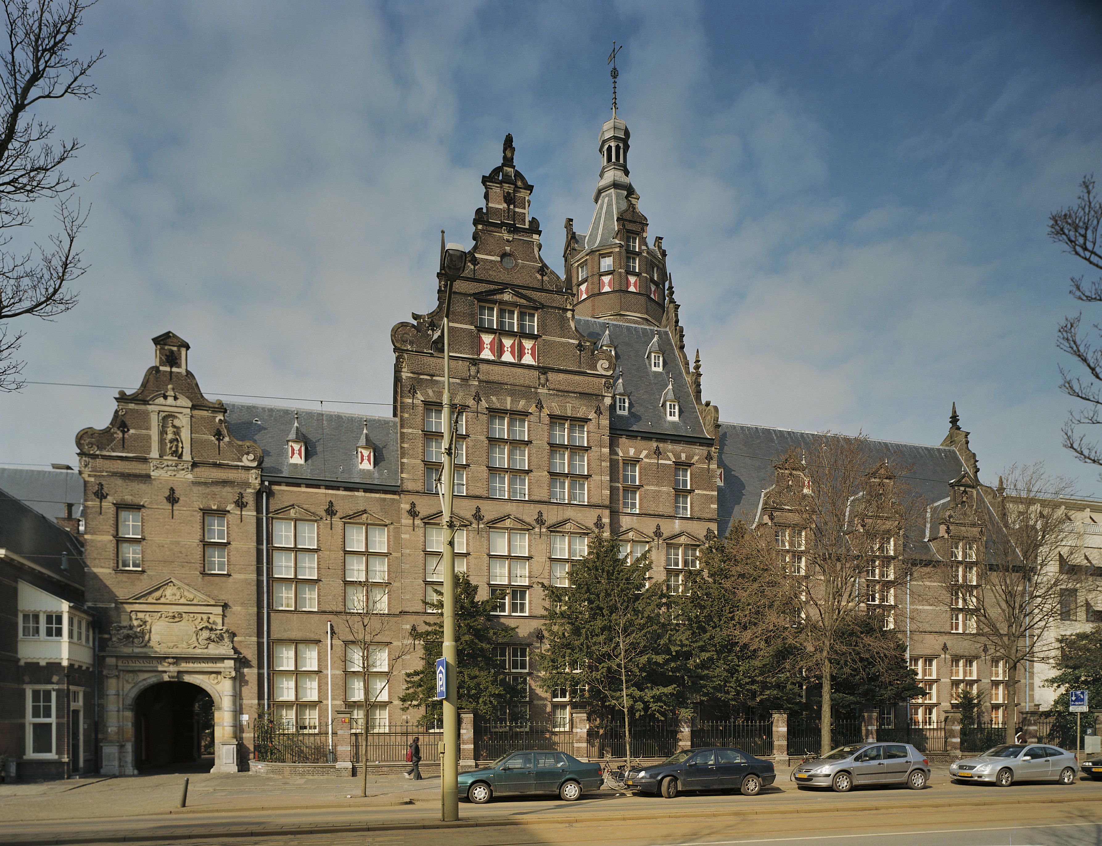 Gymnasium: Zicht op topgevels en ronde toren met achtzijdige bovenbouw en knobbelspits (opmerking: Gefotografeerd voor Monumenten In Nederland Zuid-Holland)